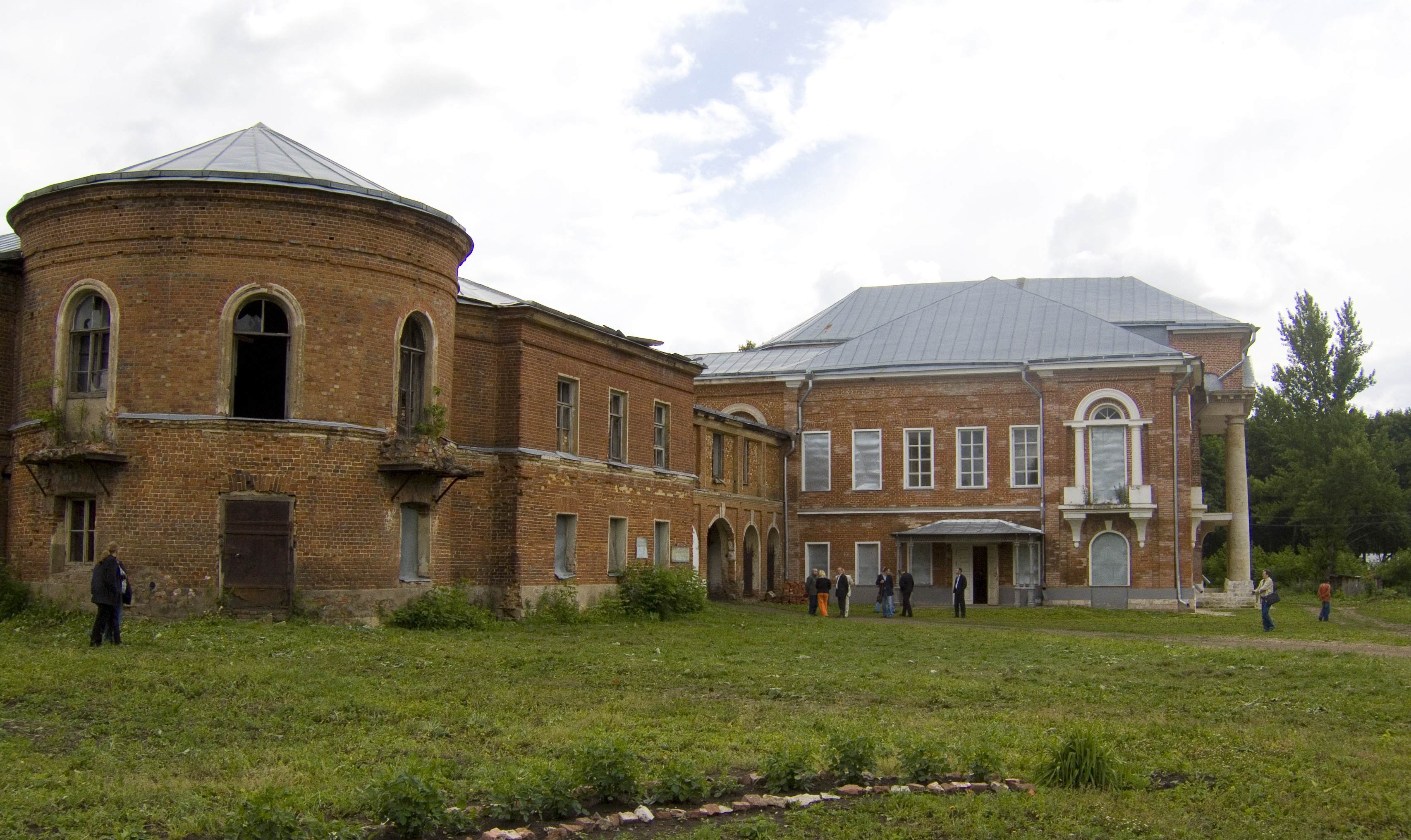 Памятник архитектуры федерального значения родовой дворец Нечаевых в усадьбе Полибино Данковского района Липецкой области. Построен в XVIII веке.